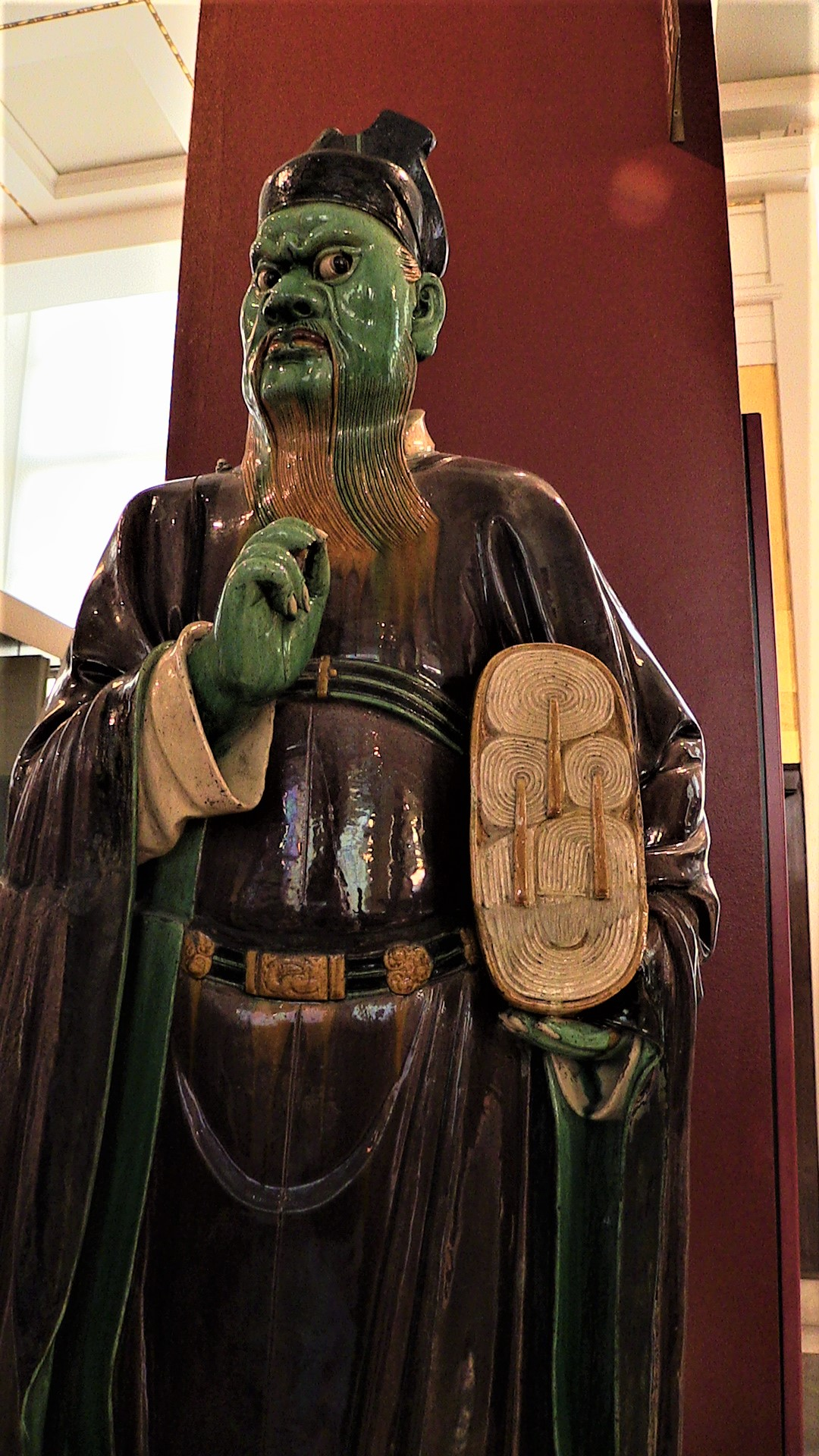 Аҧсшәа